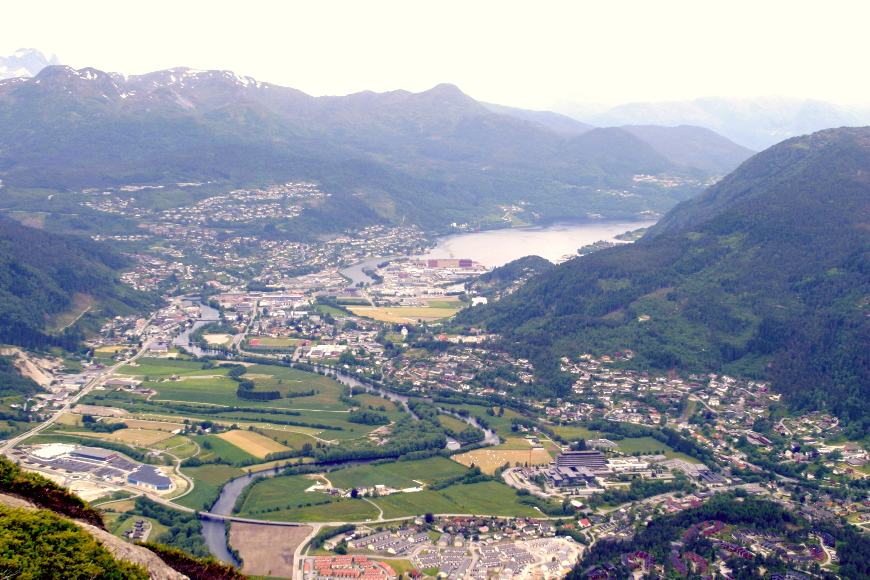 Førde sentrum og Vie